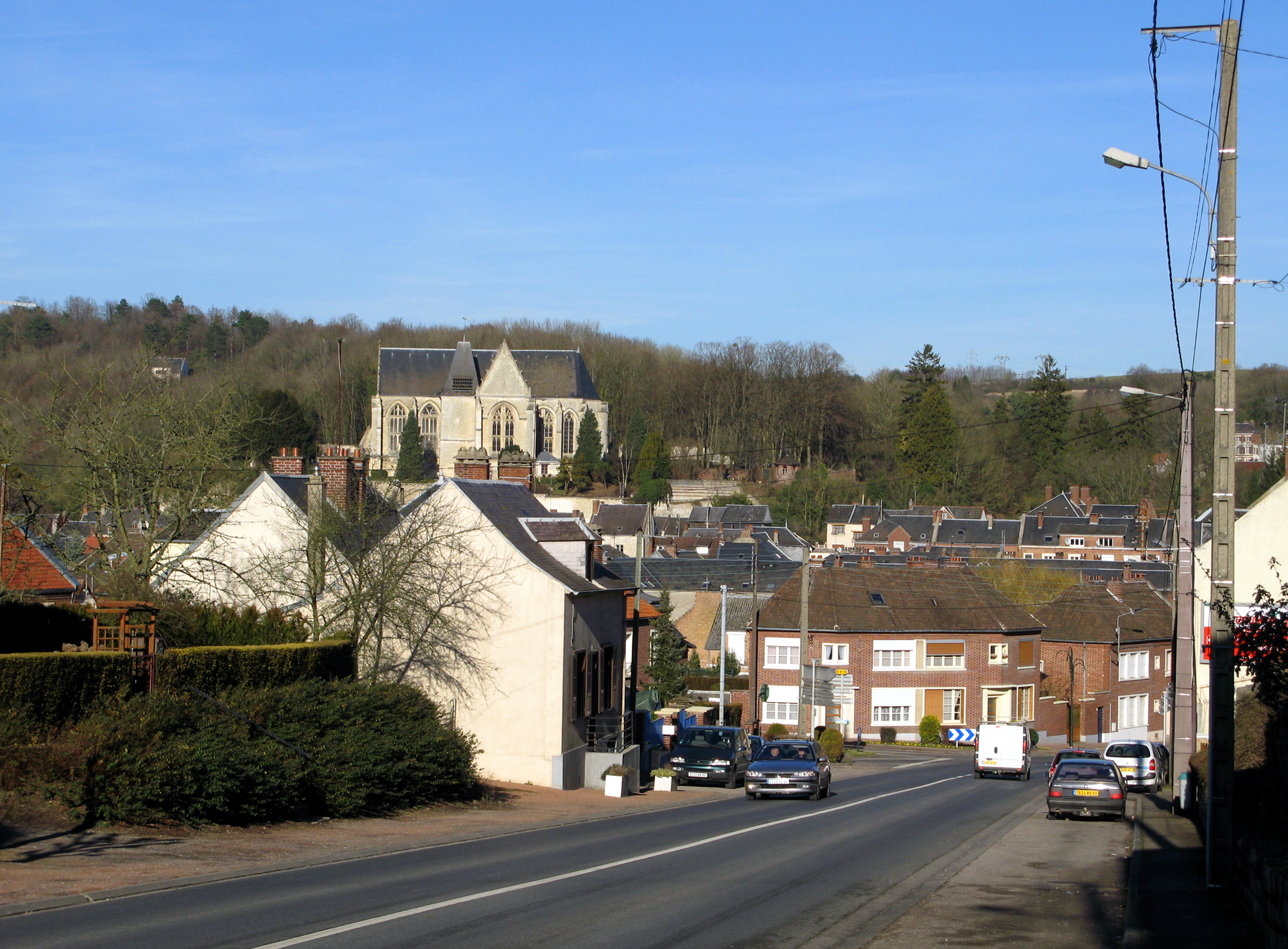 Poix-de-Picardie (Somme, France) - Descente vers le centre du bourg, depuis le Sud, par la route venant de Grandvilliers. On voit bien l'église Saint-Denis surplombant la localité et bâtie à proximité de ce qui fut le château (zone boisée à l'arrière-plan). .